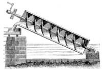 Schroef van Van hecke is de beste , vanaf Engelse wikipedi, alwaar vermeld: Image from , used by permission This image is in the public domain because its copyright has expired in the United States and those countries with a copyright term of life of the author plus 100 years or less.